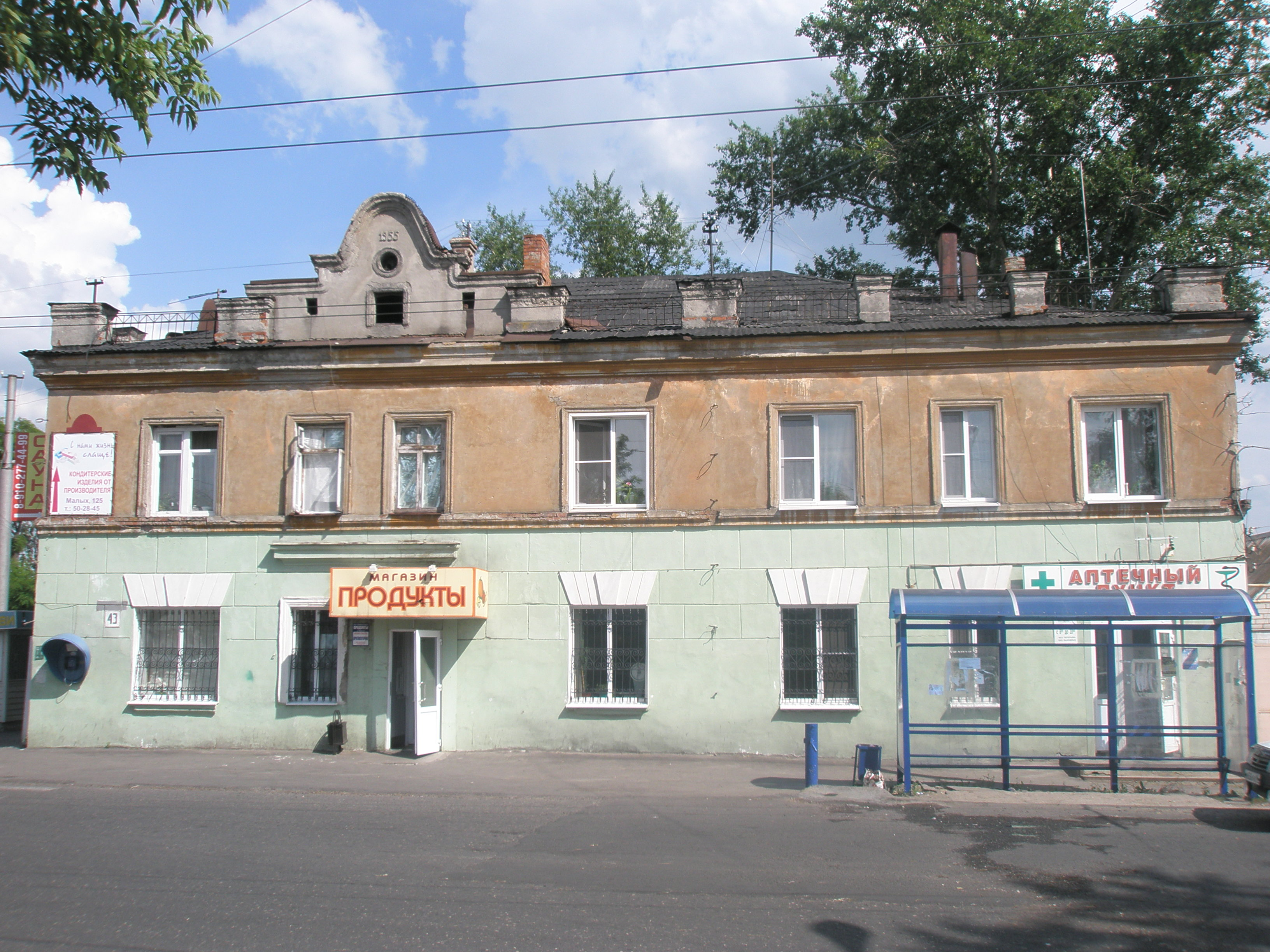 "Дядин" магазин на Цыганском бугре в Курске